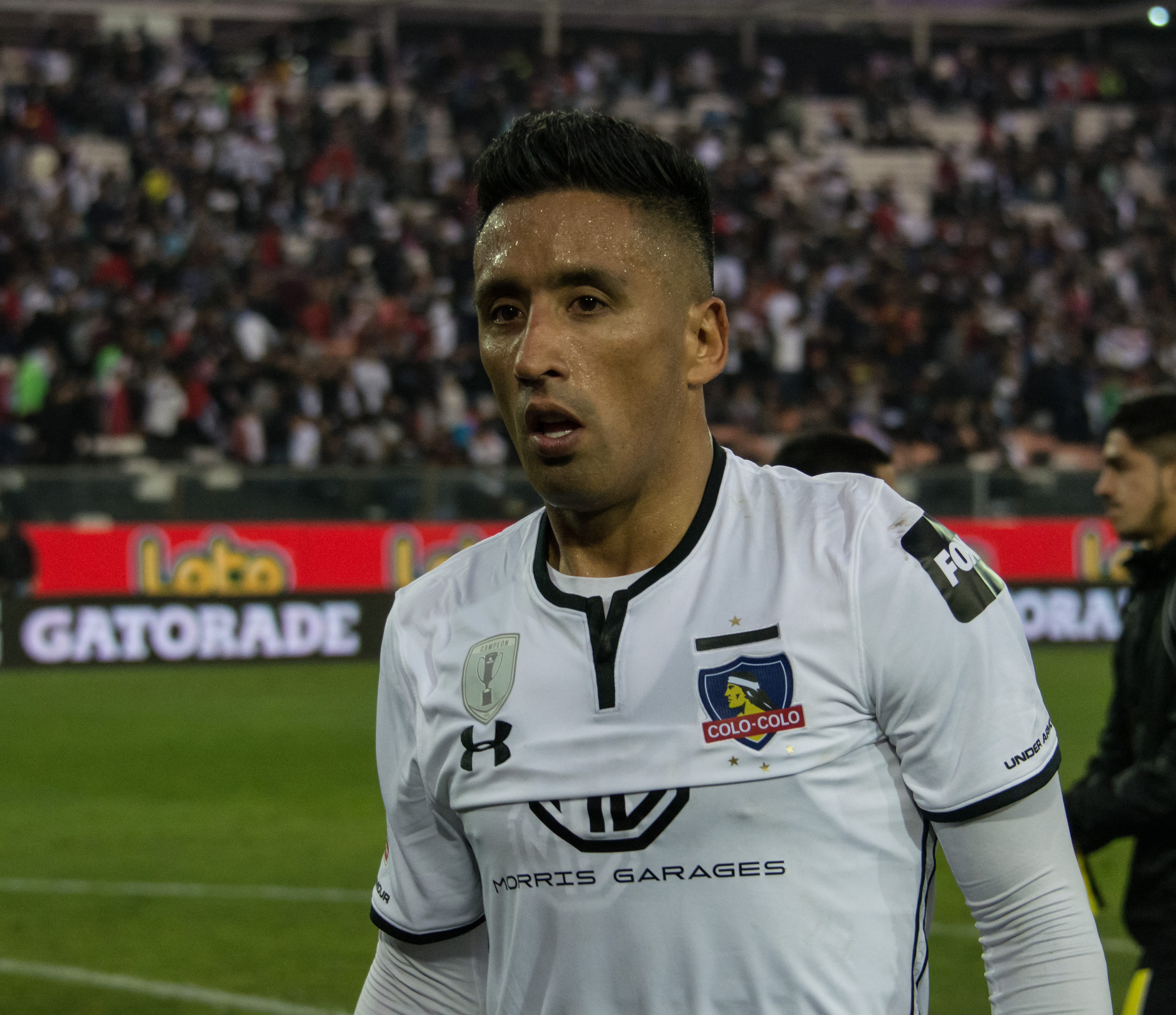 Lucas Barrios, Colo-Colo v San Luis, Estadio Monumental, Macul, Santiago, Chile.